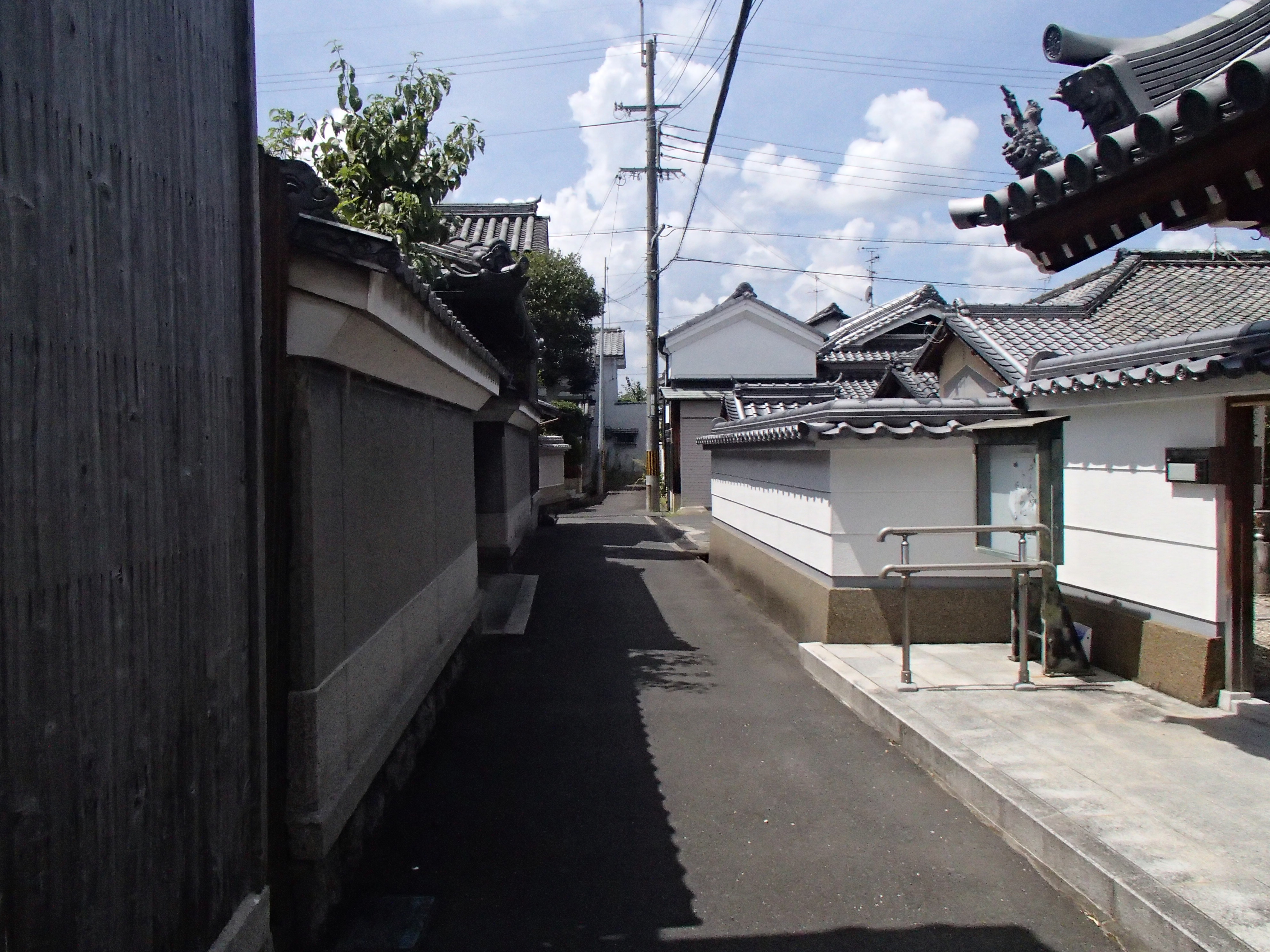 集落内の路地